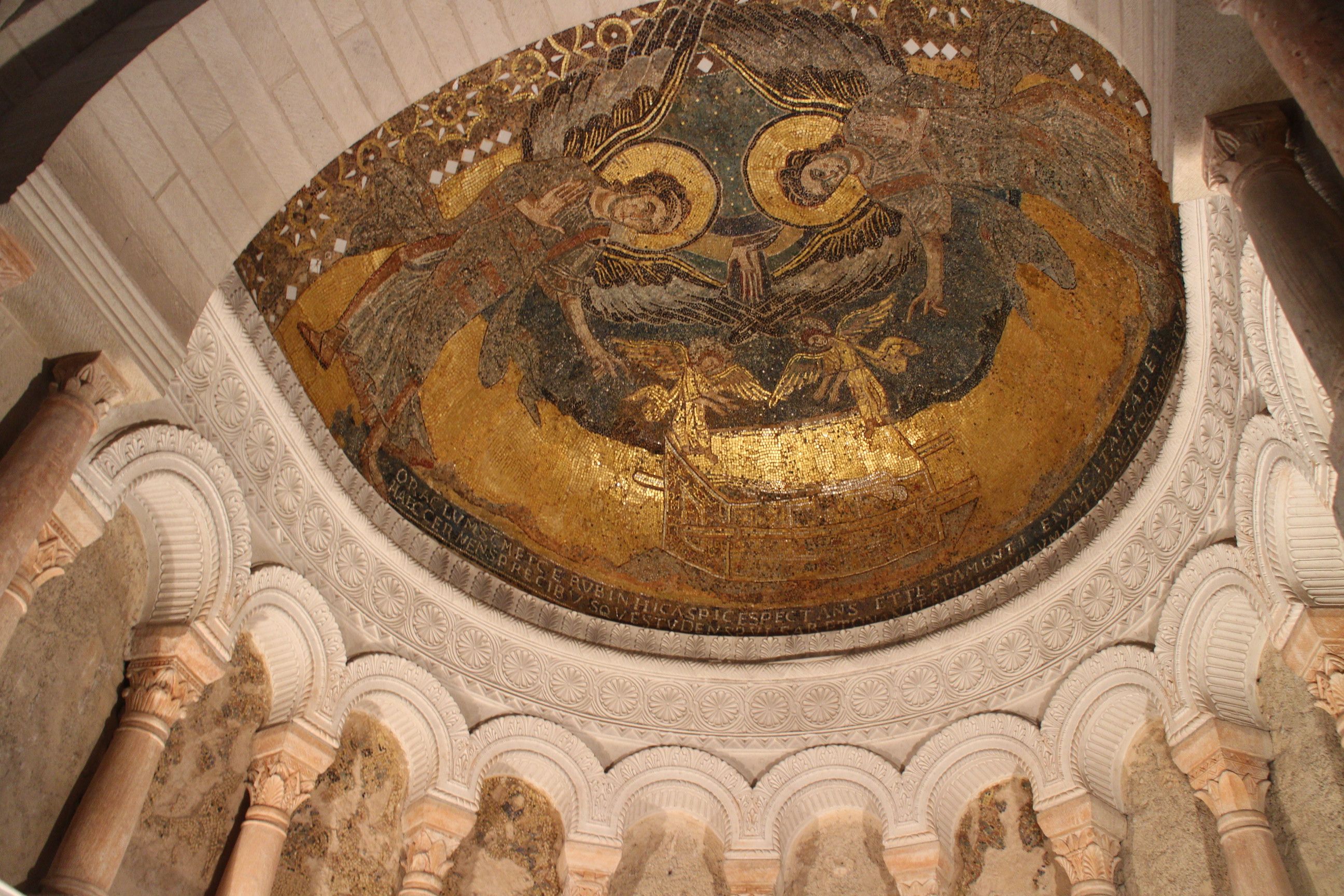 Mosaïque carolingienne du temps de la querelle des images